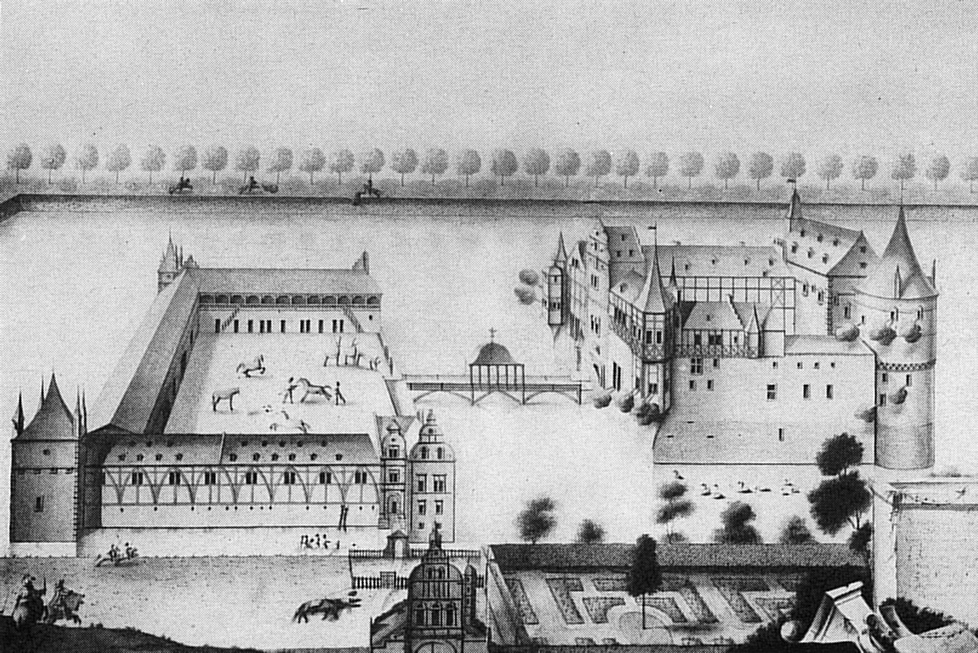 Zeichnung der Burg Adendorf in Wachtberg-Adendorf mit der Bausituation um das Jahr 1600